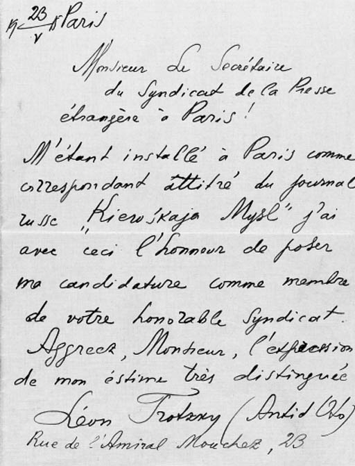 Autograph letter signed (Paris, 23 May 1915)